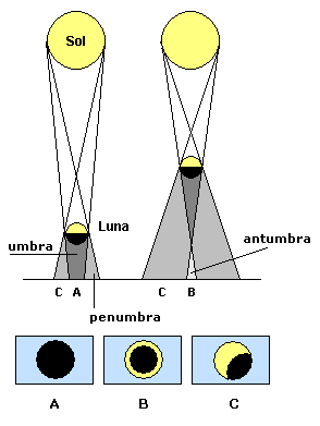 AUTHOR: Francisco Javier Blanco González PAÍS: España IMAGEN: tipos de eclipse solar, dependiendo de la distancia Sol-Luna -nueva versión de una anterior, ampliada- Imagen made by Paint, and x2y